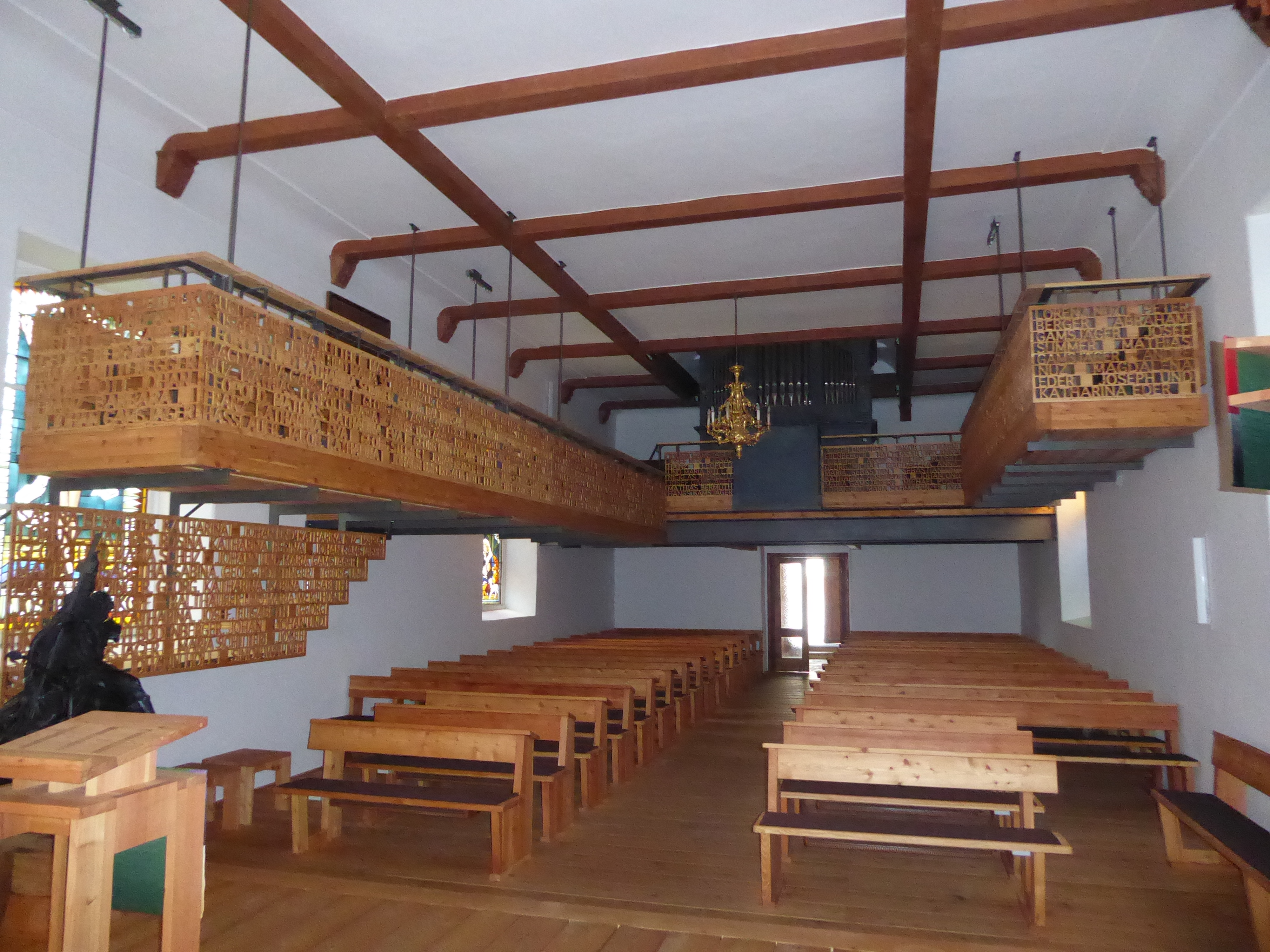 Evang. Pfarrkirche A.B. Mitterbach am Erlaufsee, Niederösterreich (nach der Restaurierung 2016) - Empore mit den eingefrästen Namen der ersten bekennenden Gläubigen gemäß den „Annaberger Protokollen“ aus 1782 (Bauherrenpreis 2018 für Architektenduo Anja Fischer und Ernst Beneder und Pfarrerin Birgit Lusche) Dieses Bild wurde anlässlich des österreichischen Tags des Denkmals 2018 in Niederösterreich eingereicht.